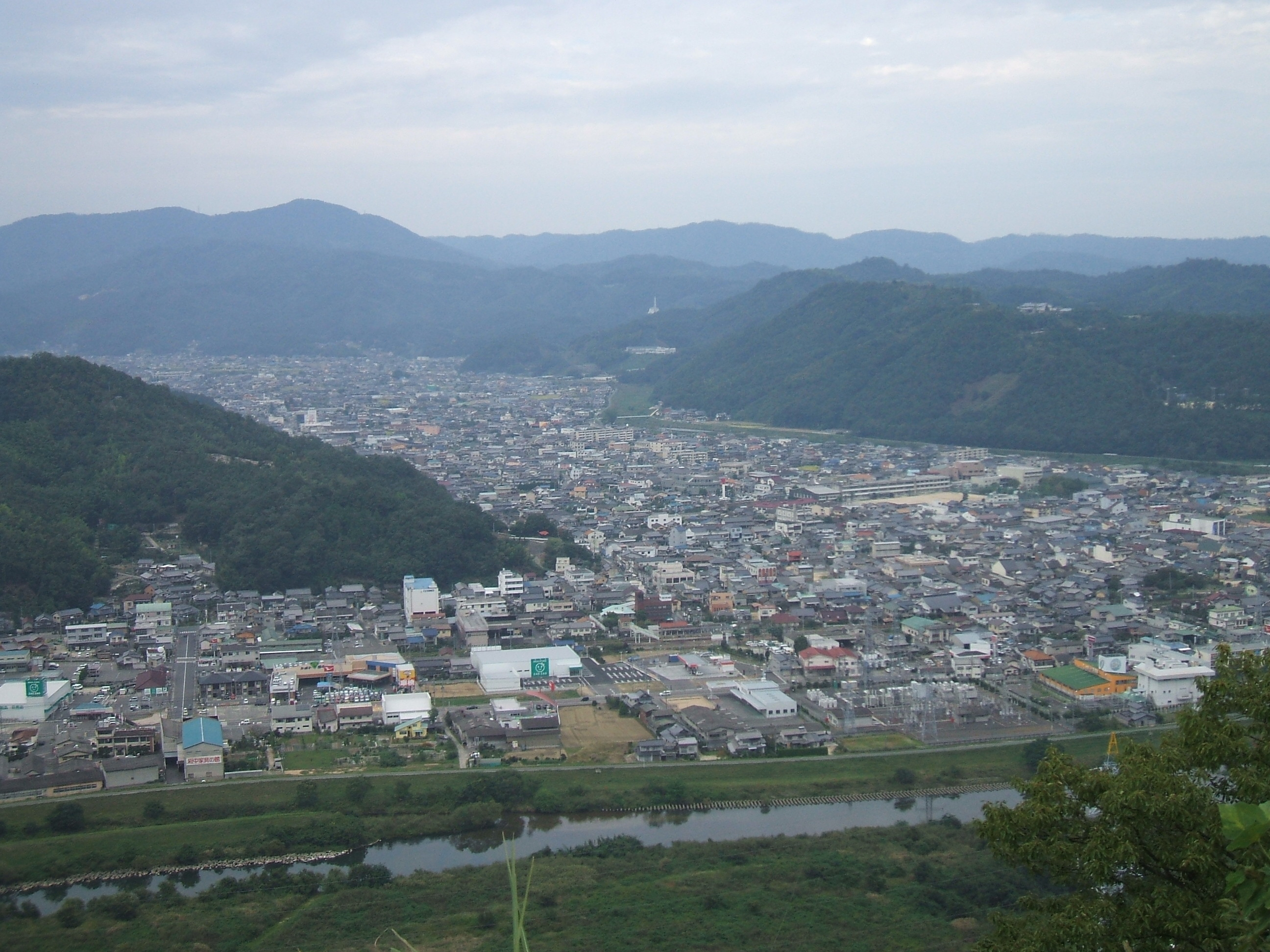 広島県福山市新市町の中心部